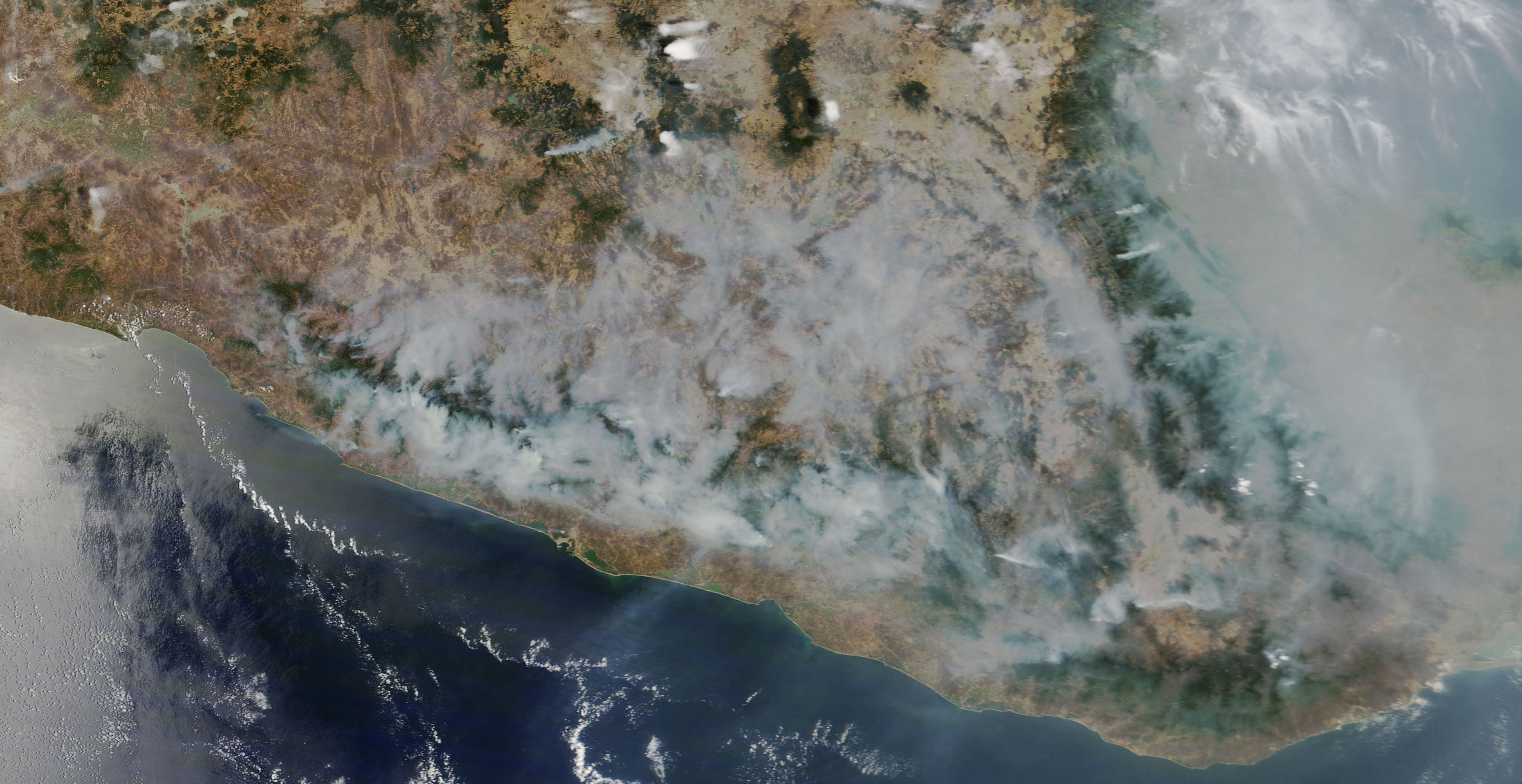 Fires have raged for nearly a week in the coastal state of Guerrero in south-central Mexico. On May 8, 2019, the Secretary of Civil Protection reported 23 active forest fires throughout the state. The fires have been difficult to control because of strong winds. One fire has destroyed hundreds of hectares in the community of El Calvario, a town located in the state capital municipality, Chilpancingo. Local officials declared that the fire had been fully contained as of May 8, 2019. “Fully contained” does not mean the fire has ceased, but that the fire’s perimeter has been completely surrounded by a barrier or buffer zone that helps keep the fire from passing a certain point. This image shows smoke from the fires as observed on May 9, 2019, by the Moderate Resolution Imaging Spectroradiometer (MODIS) on NASA’s Terra satellite.